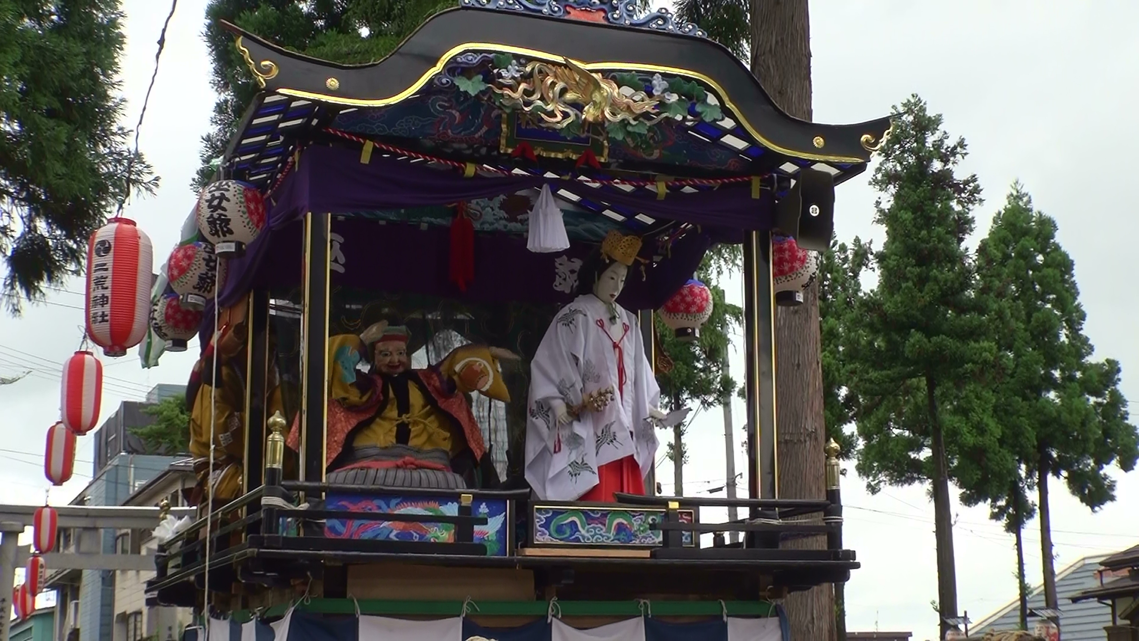 二荒神社（小千谷市）での横町巫女爺